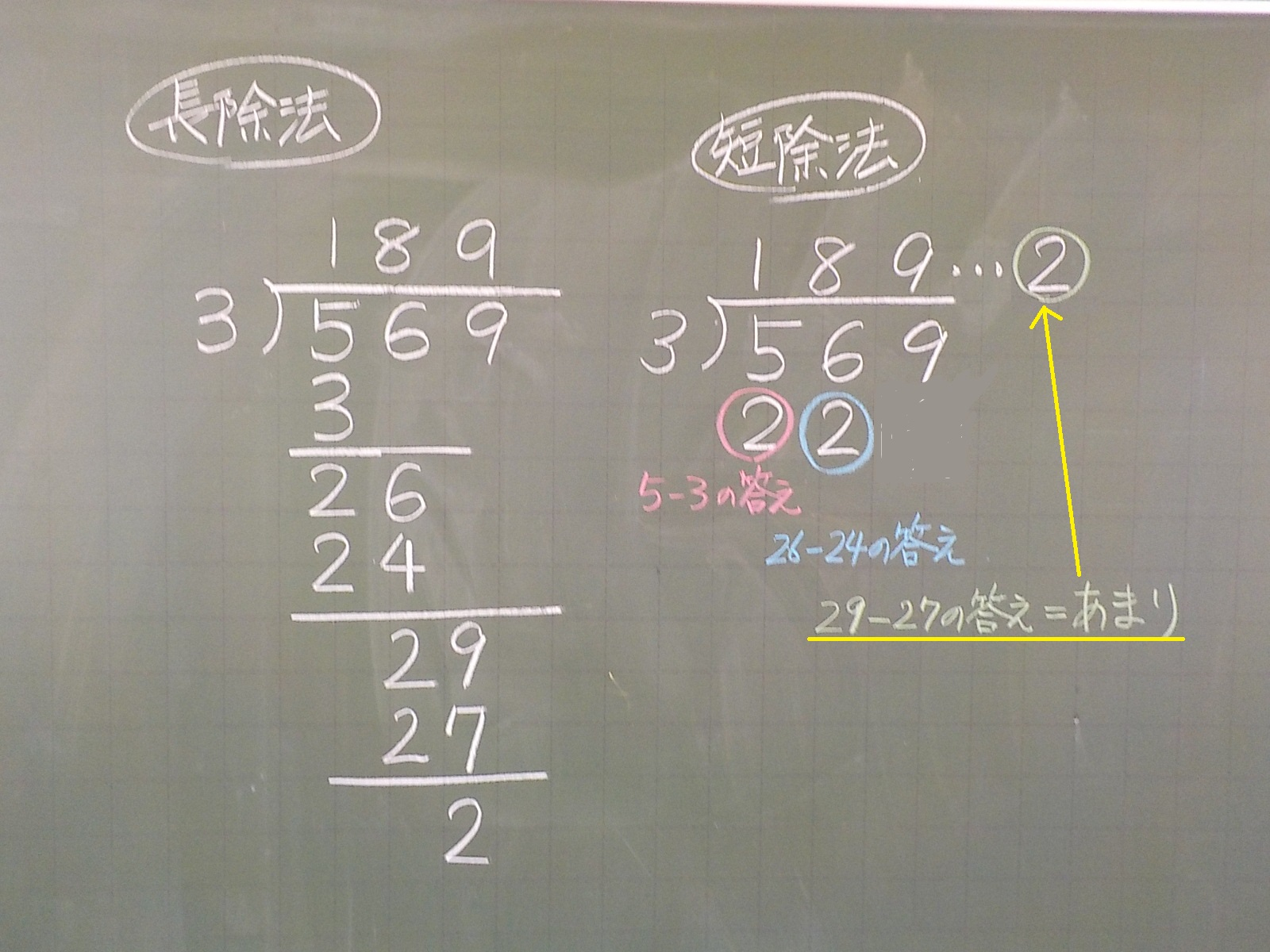 わり算の筆算のしかた「長除法」と「短除法」